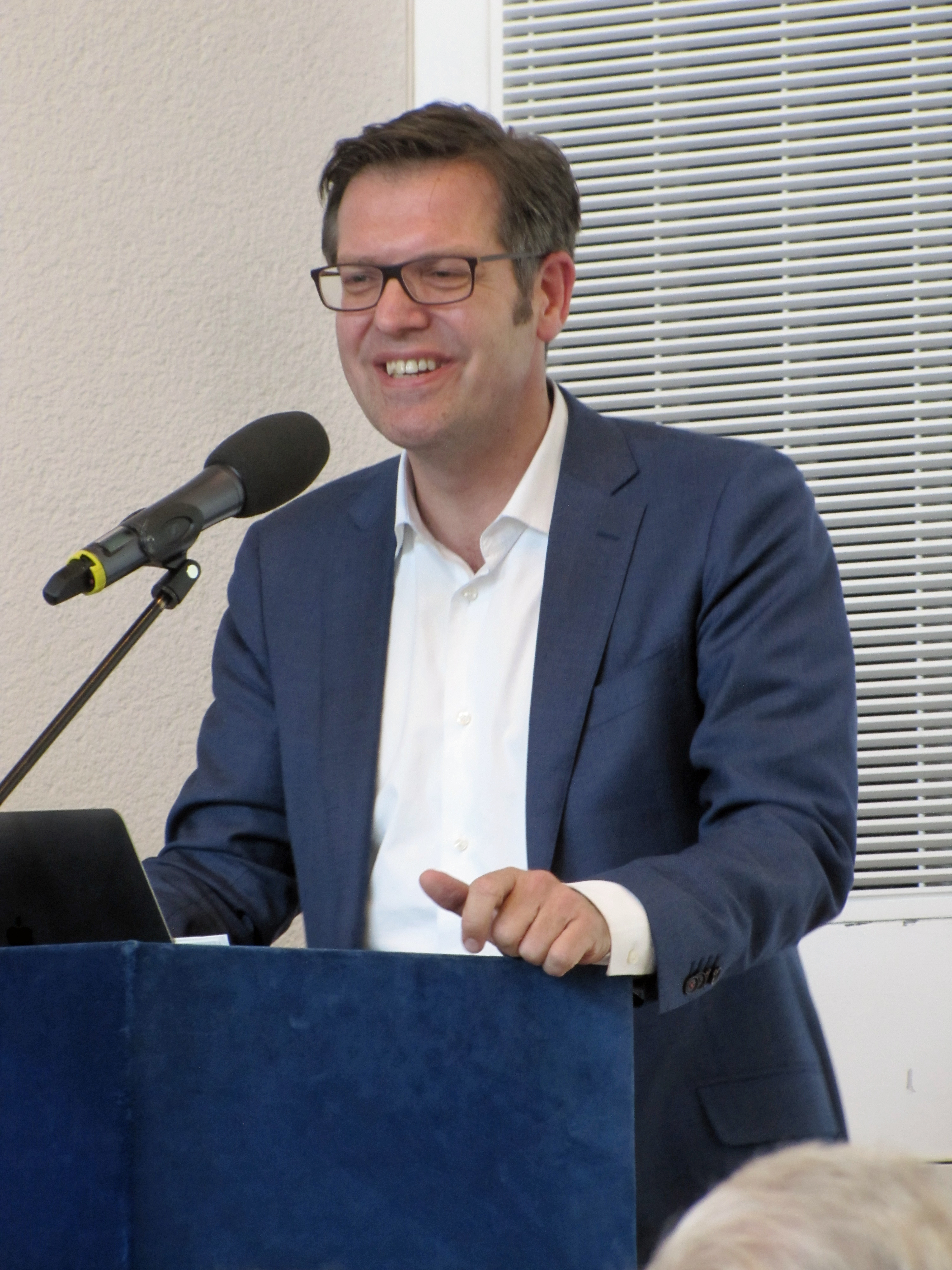 Steffen Mau, bei den 47. Römerberggesprächen, Thema:„30 Jahre nach dem Mauerfall – mehr Aufbruch wagen“, im November 2019 im Chagall-Saal der Städtischen Bühnen in Frankfurt am Main.